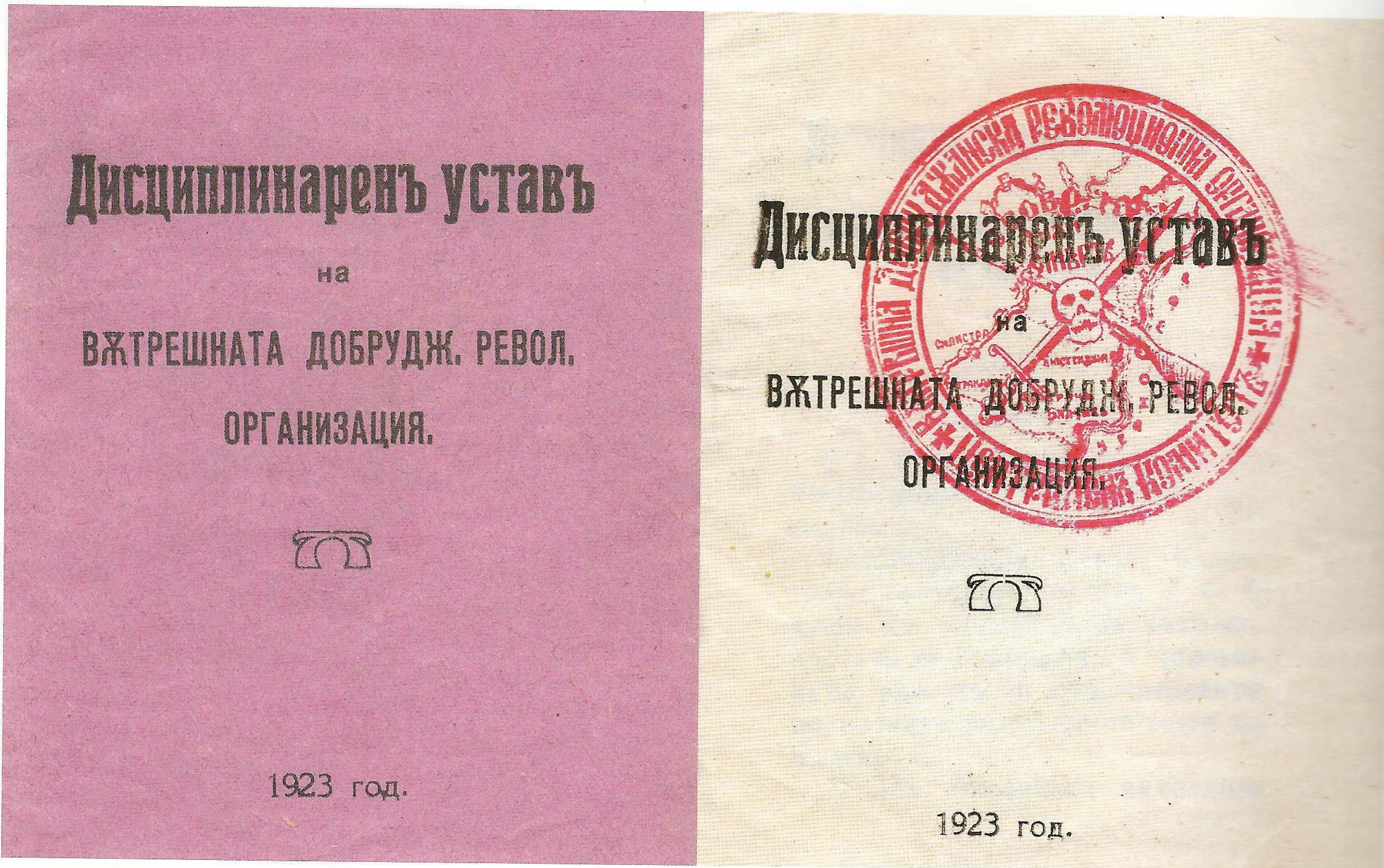 Дисциплинарен устав на ВДРО